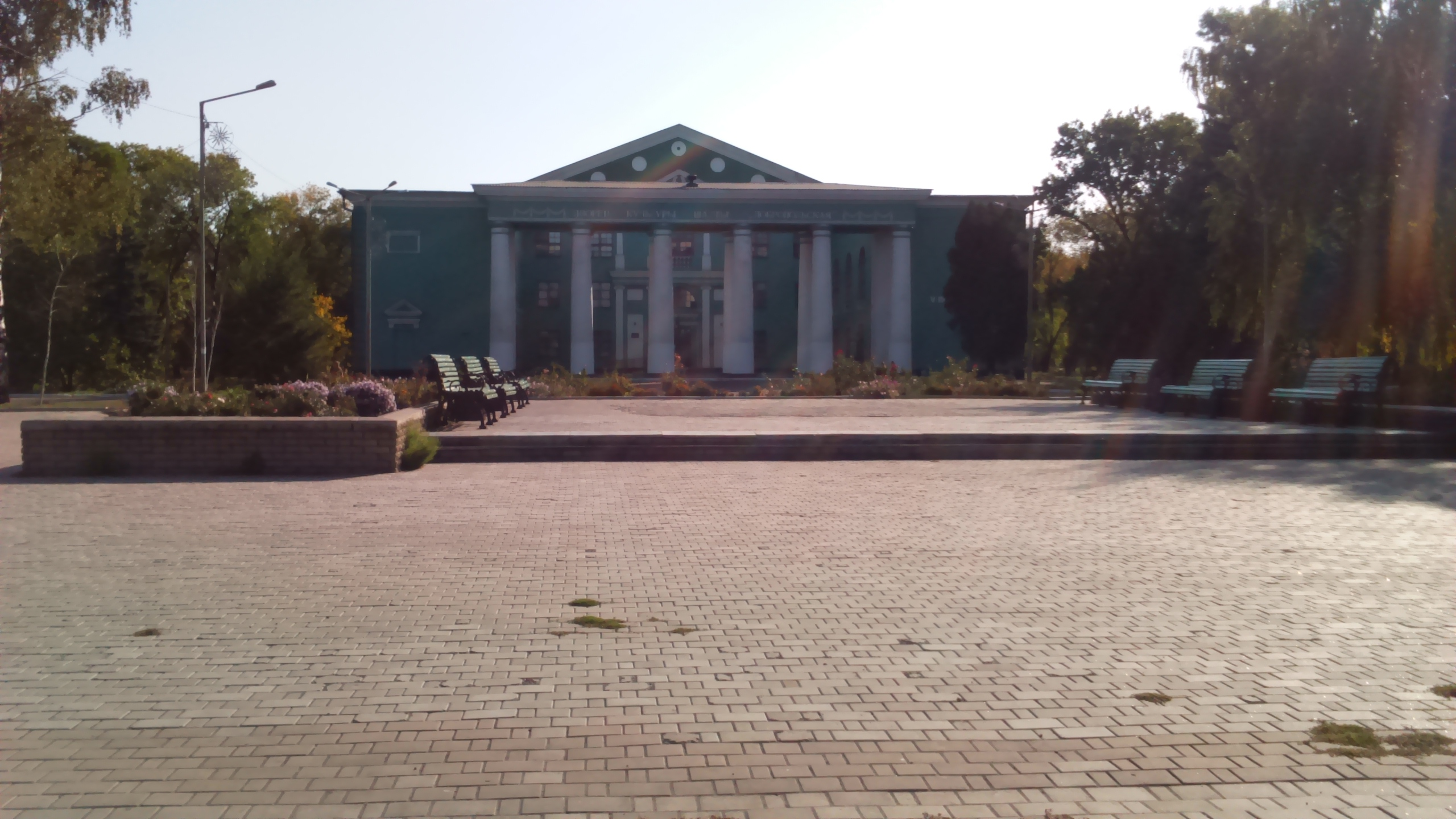 Центральна площа міста Добропілля